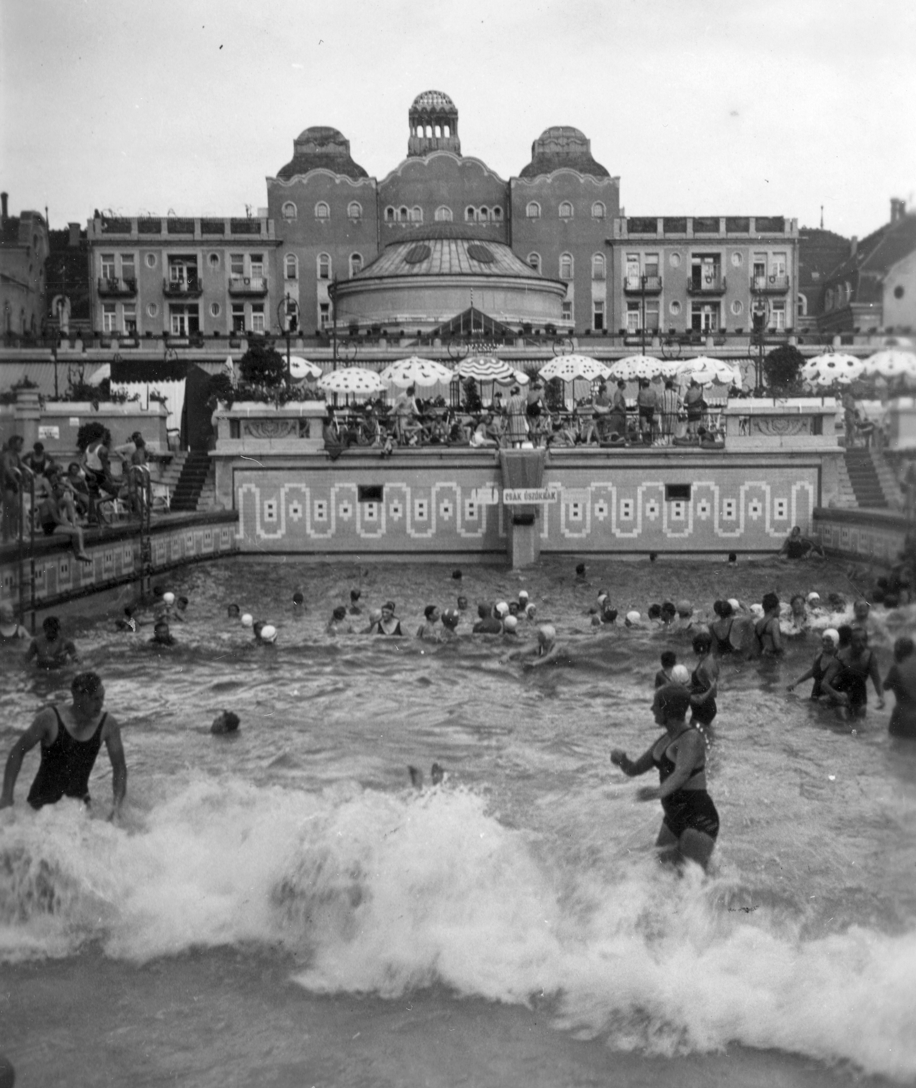 Gellért Gyógyfürdő, hullám medence. Location: Hungary, Budapest XI. Tags: pool, swimming pool, Budapest Title: Gellért Gyógyfürdő, hullám medence.